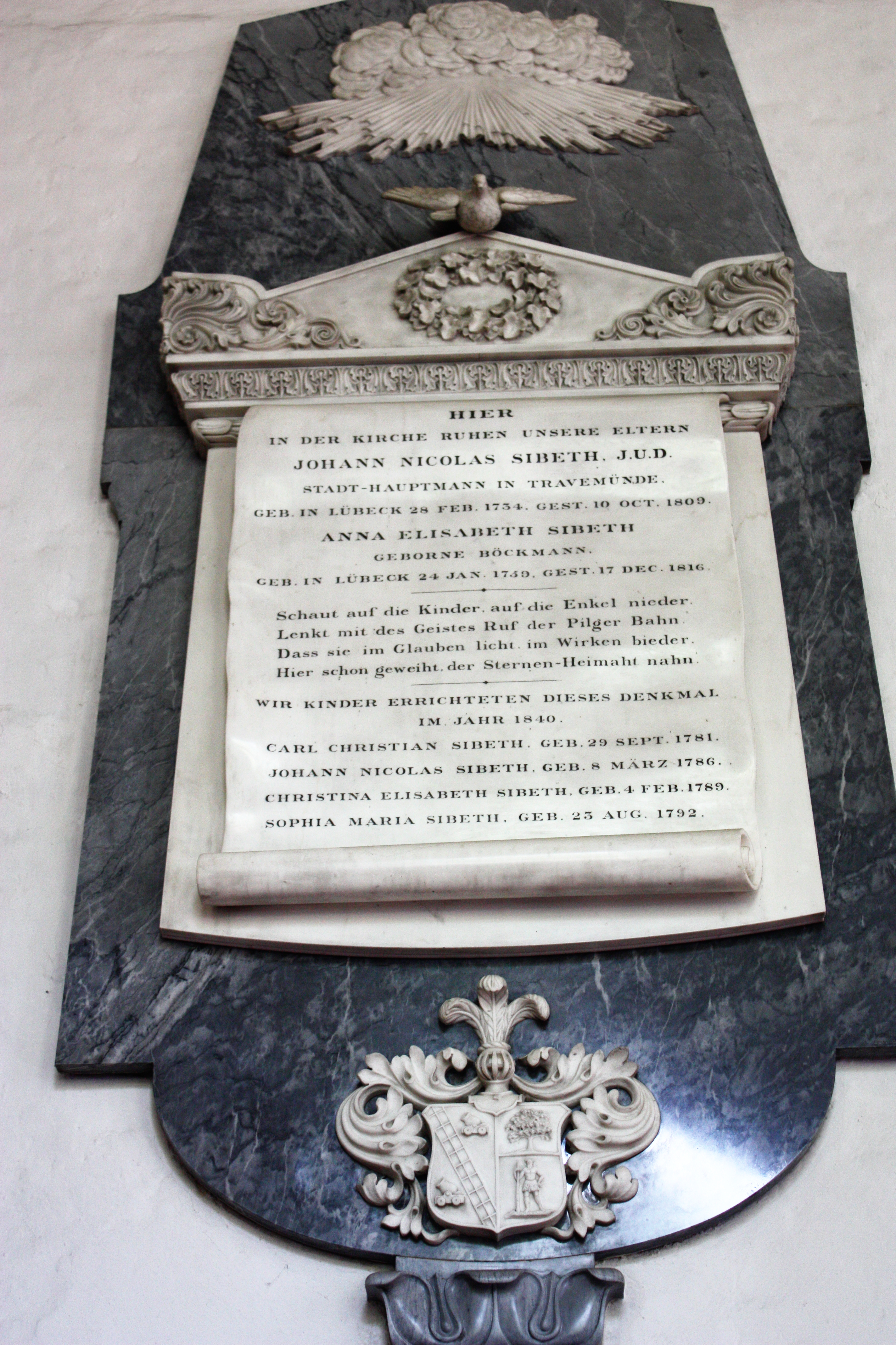 Kirche St. Lorenz, in Travemünde